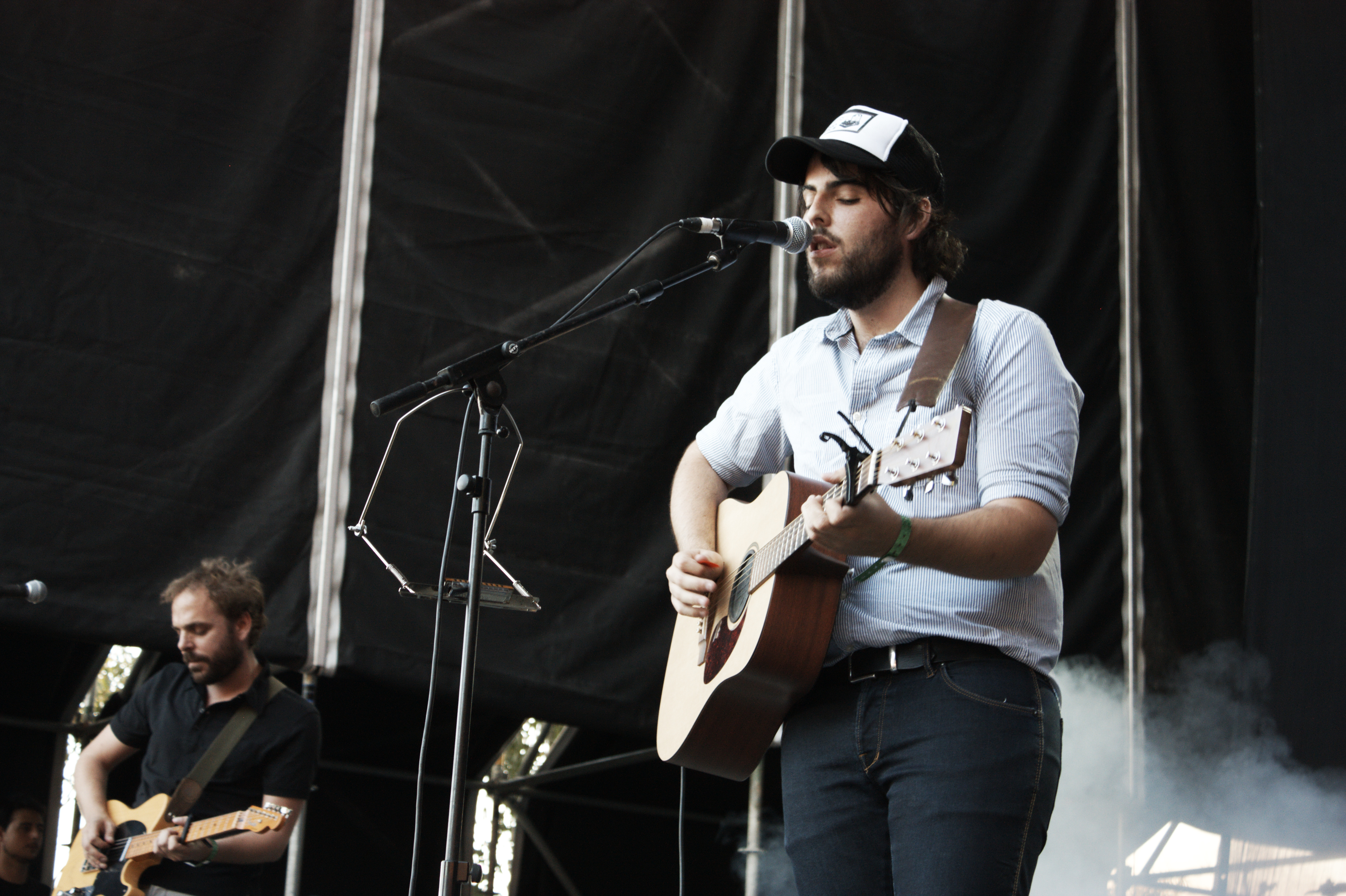 Mañana en el Contempopranea 2010. Alburquerque (Badajoz) 24/07/2010